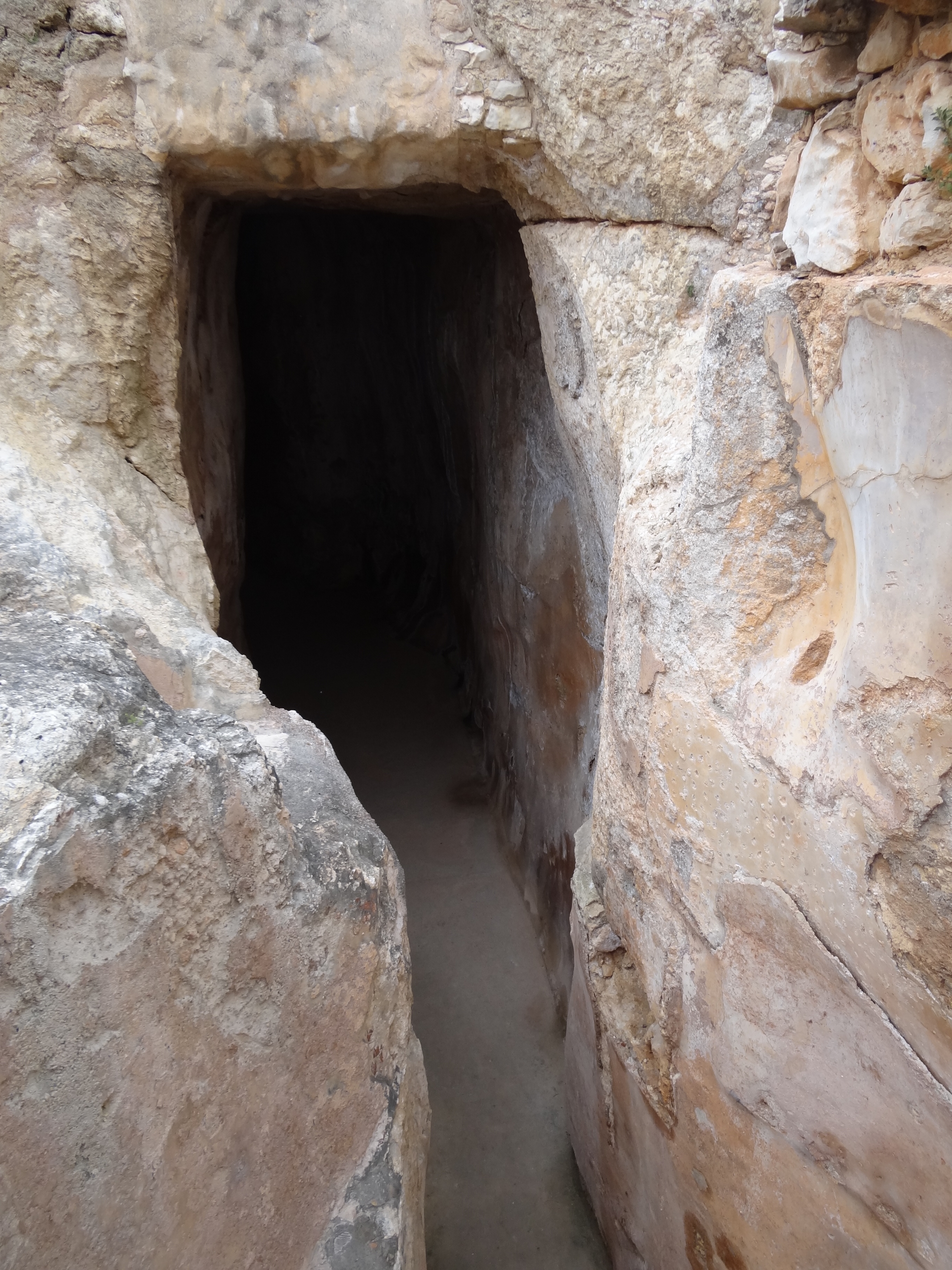 Zippori - The Ancient Water System במערכת המים העתיקה של ציפורי העיר העתיקה השוכנת בגליל